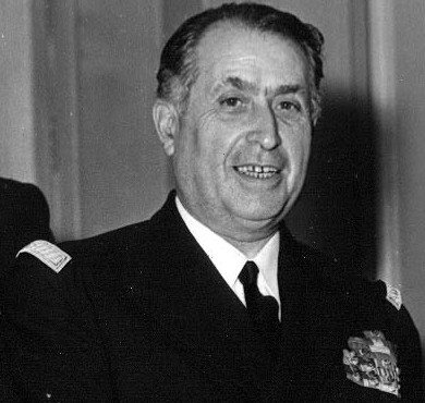 קינן מפקד השייטת מעניק אות הערכה ממשלת ישראל למפקד הצי הצרפתי אדמירל ברז'ו